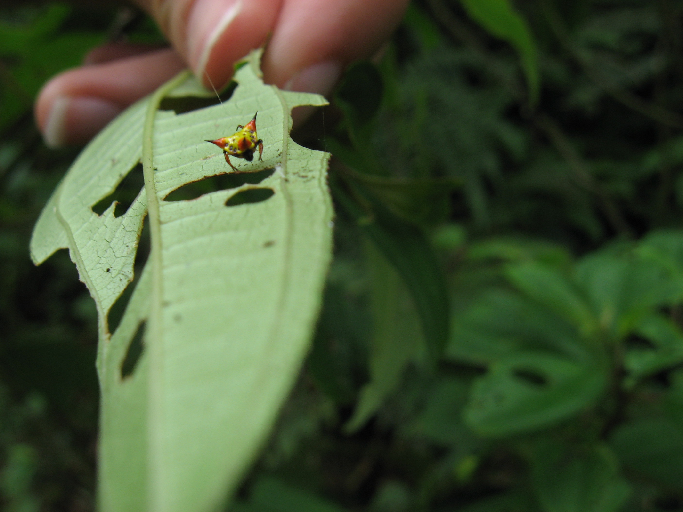 Phoroncidia tricuspidata?